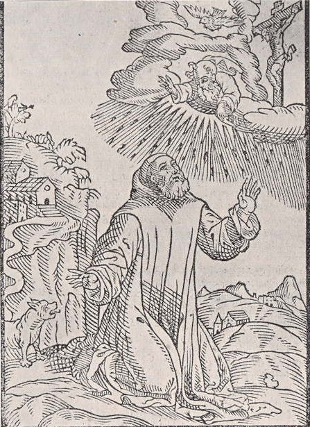 Grabado xilográfico con San Guillermo de Vercelli, de un libro impreso en Nápoles en 1581